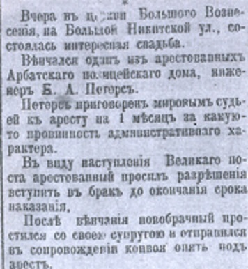 Описание свадьбы Б.А. Петерса и В.В. Шумской в газетах, 1904г.